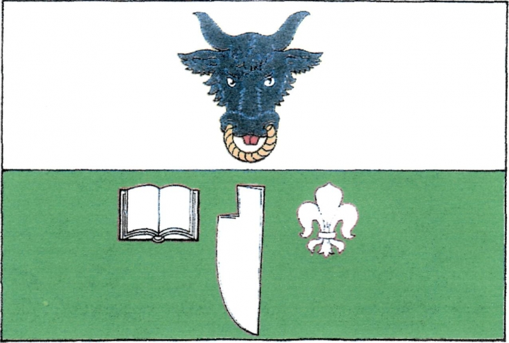 vlajka, Sejřek, okres Žďár nad Sázavou